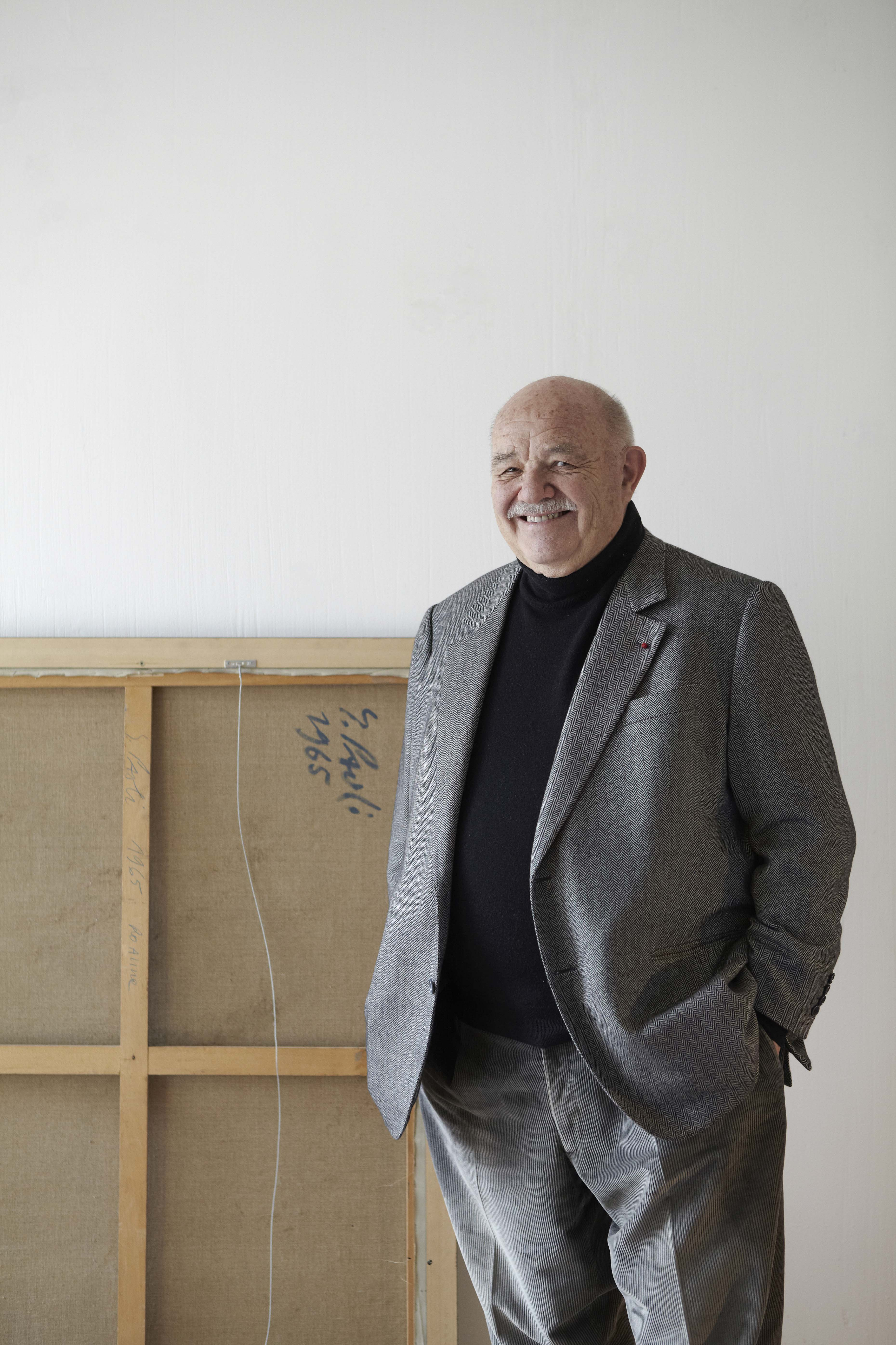 Le chef Pierre Troisgros en 2012